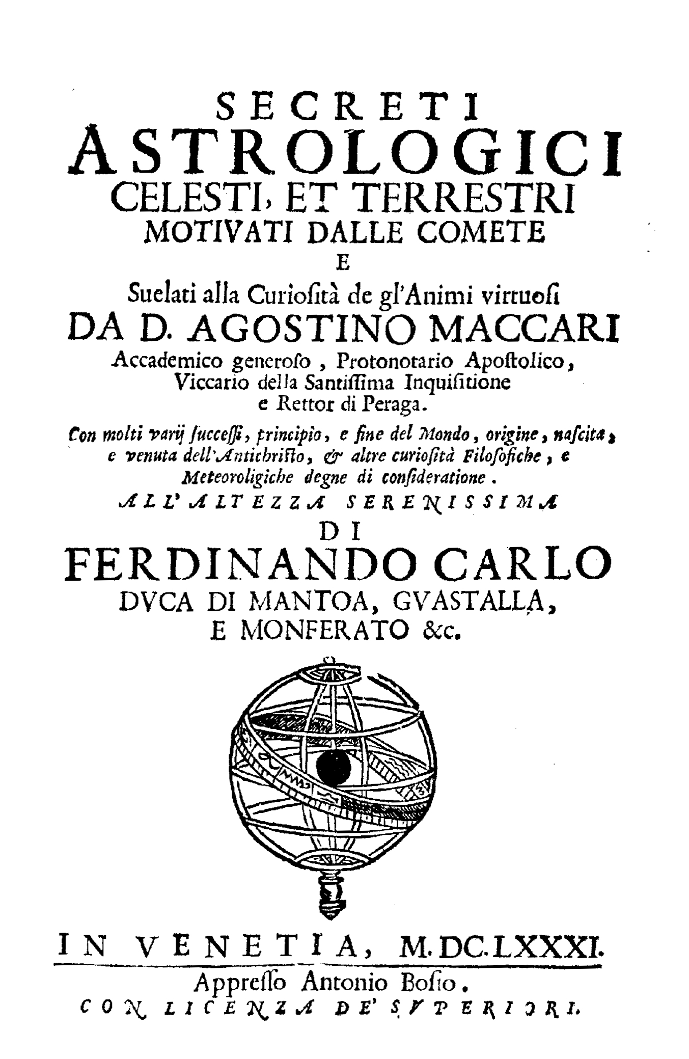 Secreti astrologici celesti, et terrestri motiuati dalle comete e suelati alla curiosità de gl'animi virtuosi da d. Agostino Maccari …. - In Venezia : appresso Antonio Bosio, 1681. - 112 p. : ill., 1 ritratto calcografico ; 4º. - Ritratto calcografico del dedicatario Ferdinando Carlo di Gonzaga-Nevers inciso da Isabella Piccini .